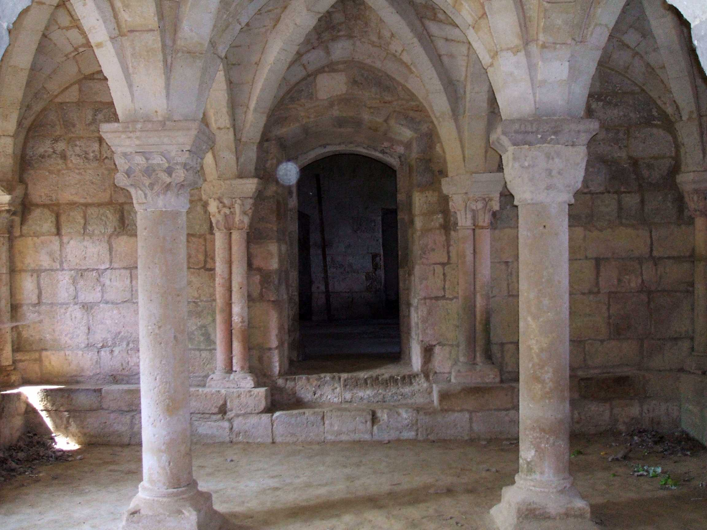 Sala capitular del antigo monasterio premonstratense de Santa Cruz de Ribas (Palencia, España)